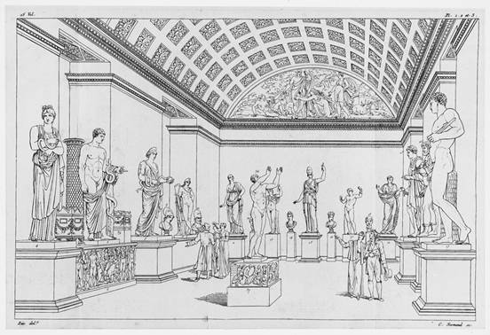 Saal der Diana mit Kasseler Skulpturen